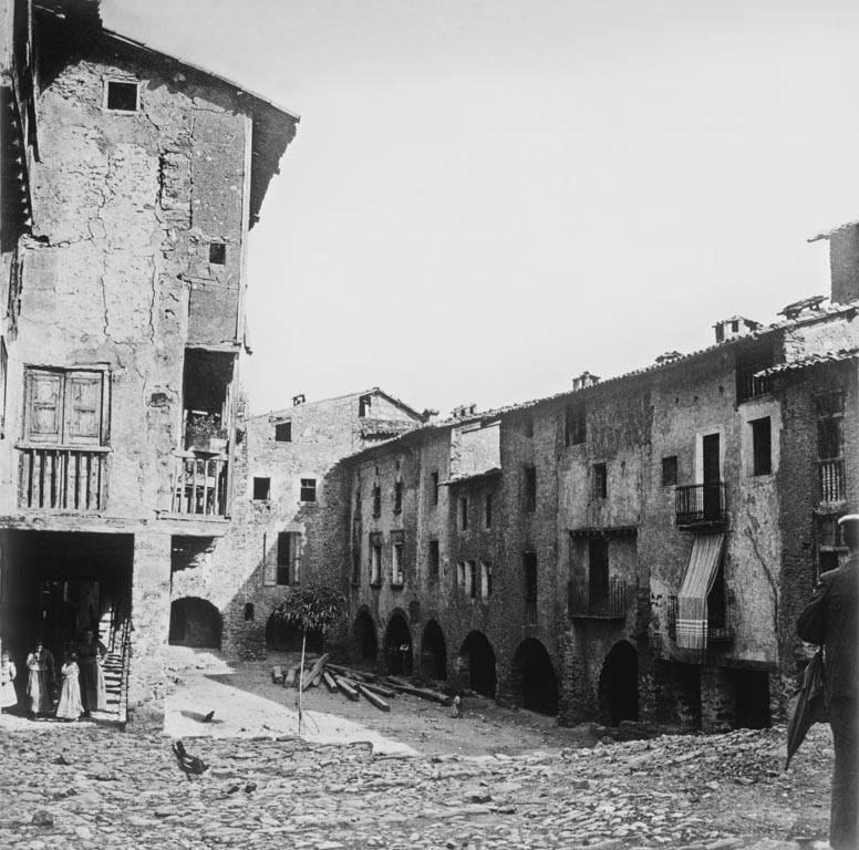 La plaça Galceran de Pinós a Bagà. Cèsar August Torras i Ferreri (1904)